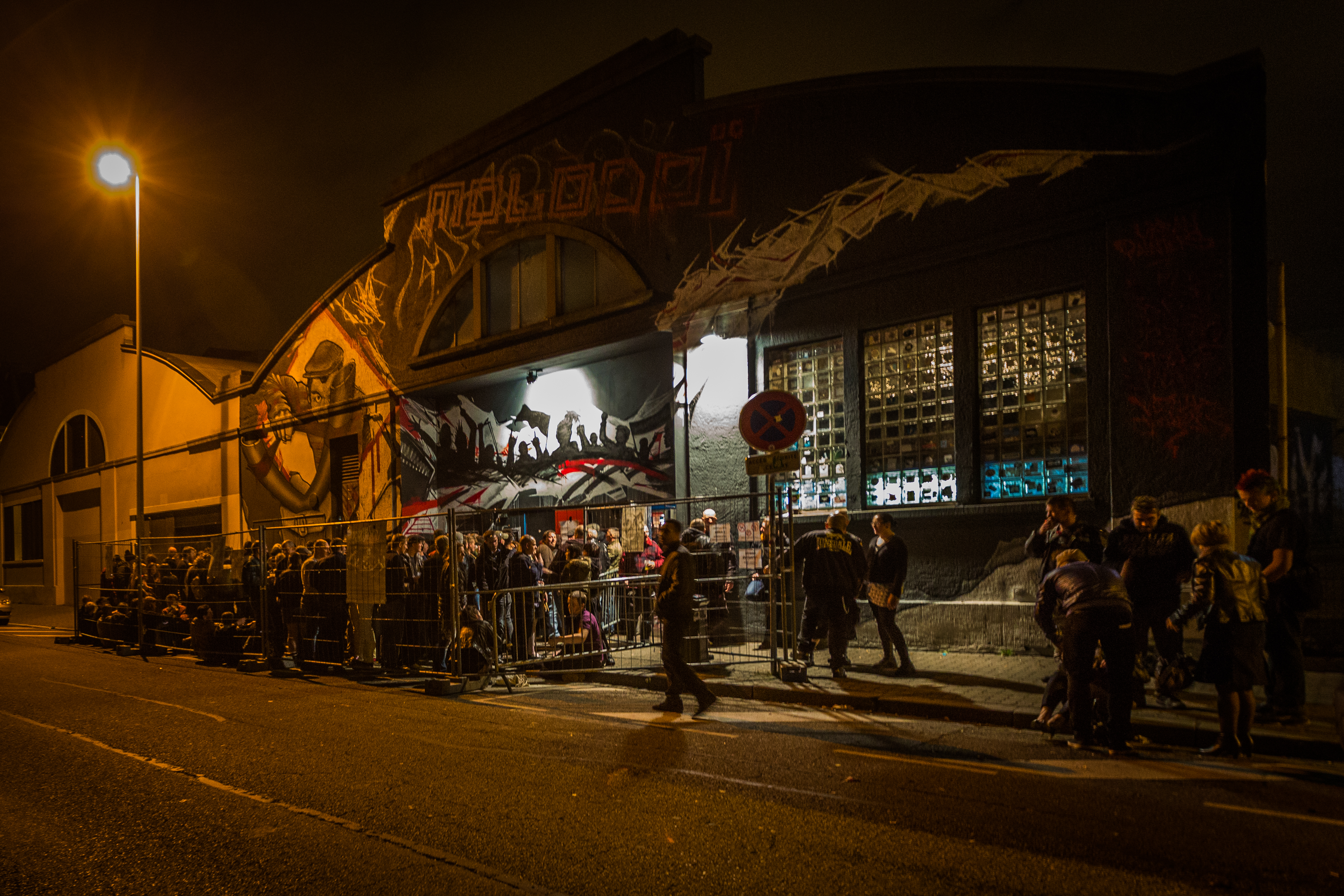 Le Molodoï, centre autonome jeune, est une association loi de 1901 créée en 1988 et une salle de spectacle alternative et autogérée à vocation culturelle et sociale située à Strasbourg, en France.